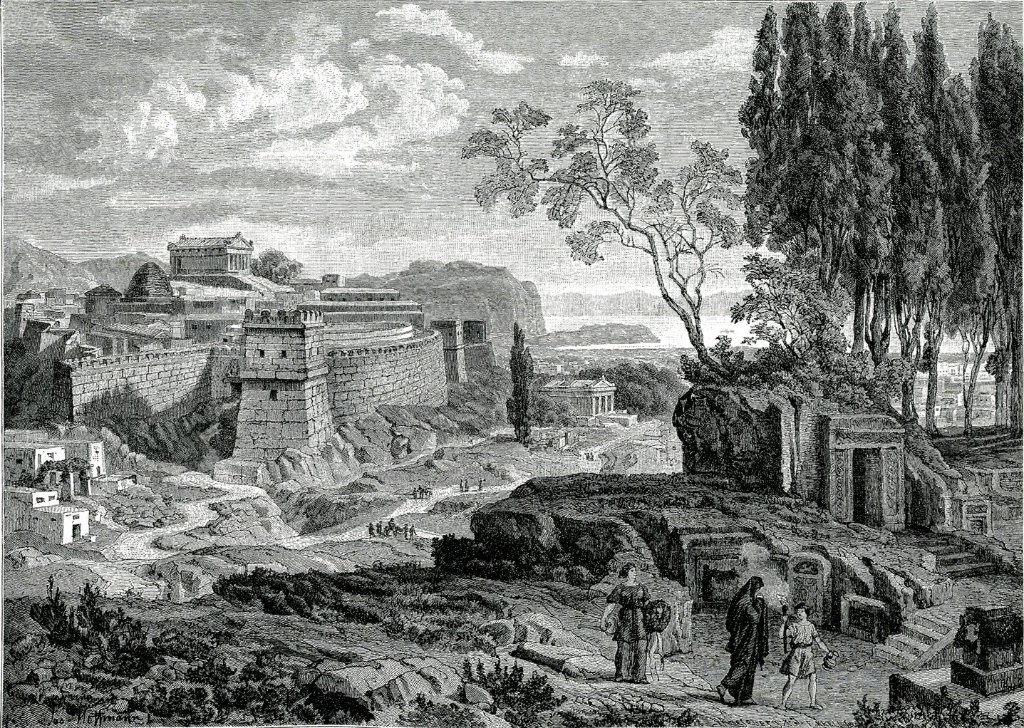 Ιάκωβος Φάλκε. Ελλάς, ο Βίος των Αρχαίων Ελλήνων. Κατά το γερμανικό του Ιακώβου Φάλκε, Ν. Γ. Πολίτης (μετ.), Αθήνα, Κάρολος Βίλμπεργκ, 1887